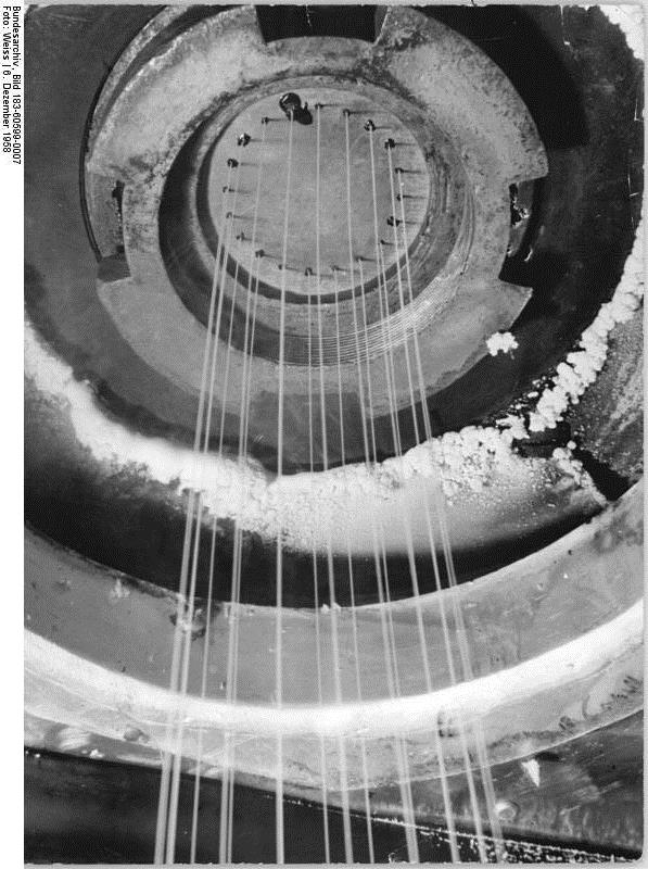 Zentralbild-Weiss Wei-He. 6.12.1958 VEB Kunstseidenwerk "Friedrich Engels". Vor großen Aufgaben stehen die 6 500 Chemiearbeiter, Ingenieure und Wissenschaftler des volkseigenen Kunstseidenwerkes "Friedrich Engels" in Premnitz, Kreis Rathenow. Das Werk produzierte in diesem Jahr u.a. 9500 t Viskosekunstseide, 2500 t Perlon-Textilfaser und in Versuchsanlagen 75 t Prelana und 15 t Lanon, beides synthetische Textilfasern. Bis 1965 wird die Prelana-Produktion in neuen Großanlagen auf 10.000 Jahrestonnen steigen. UBz: Ausspinnen eines Perlon-Fadenbündels aus der Spinndüse (Perlon-Teppichfaser)